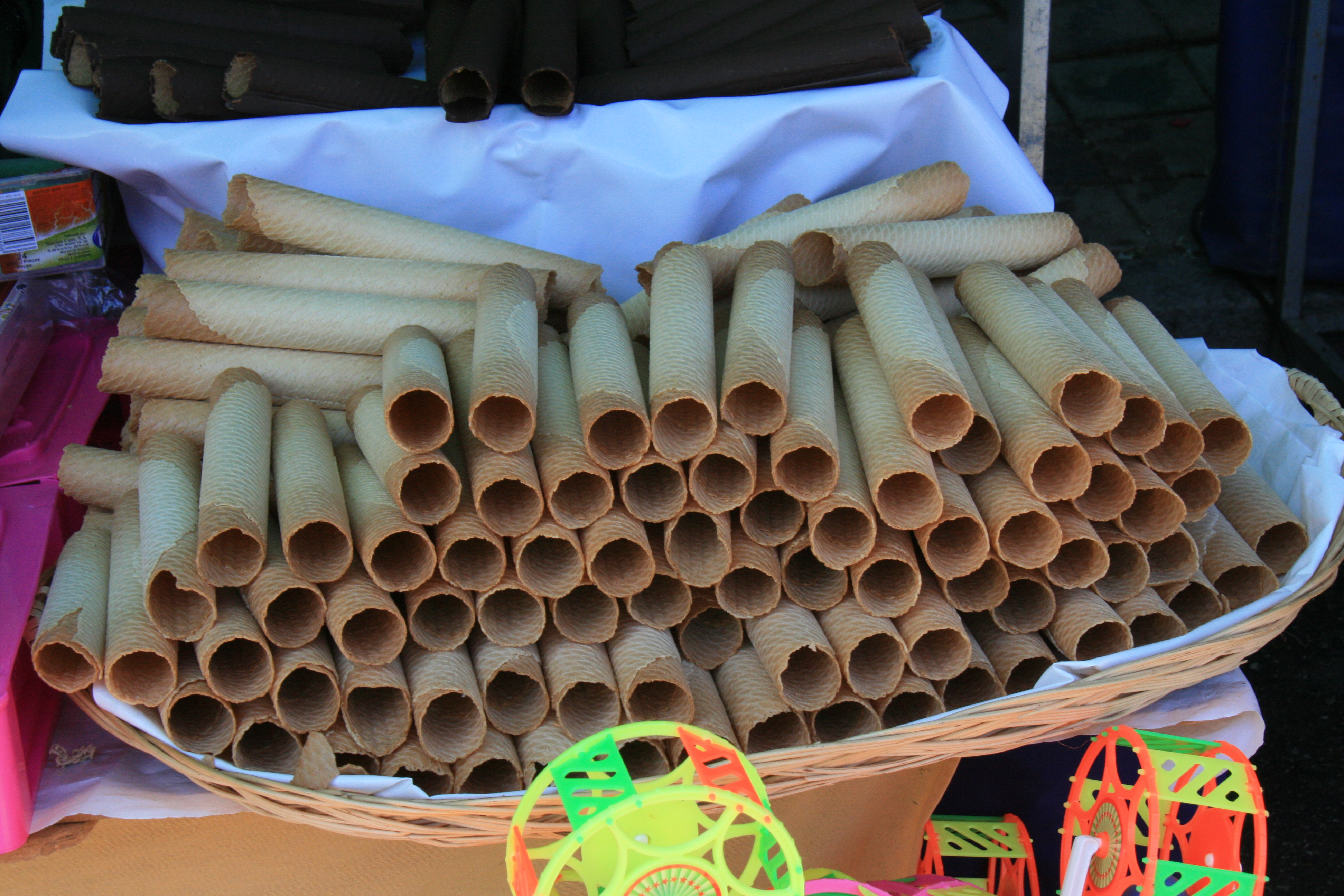 Barquillos